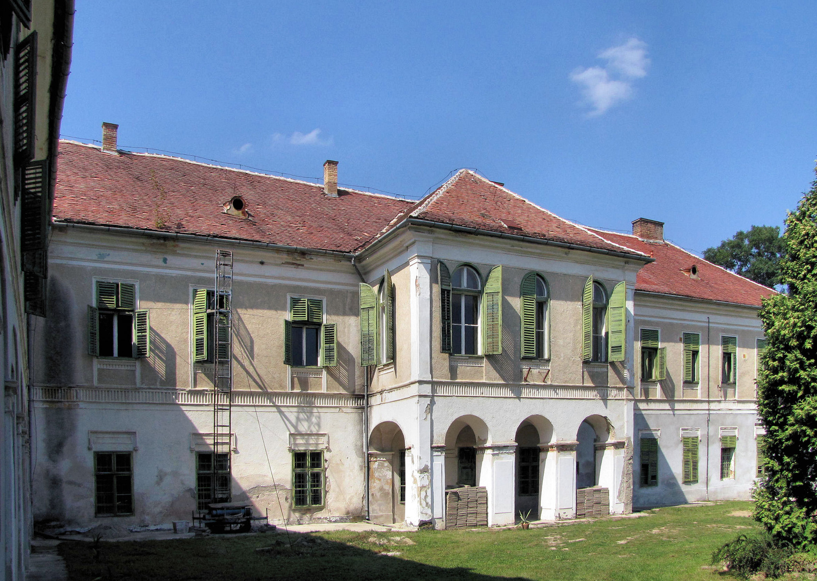 Volt Zichy-kastély (Nágocs, Ady Endre u. 15 .) This is a photo of a monument in Hungary, Identifier: 8033